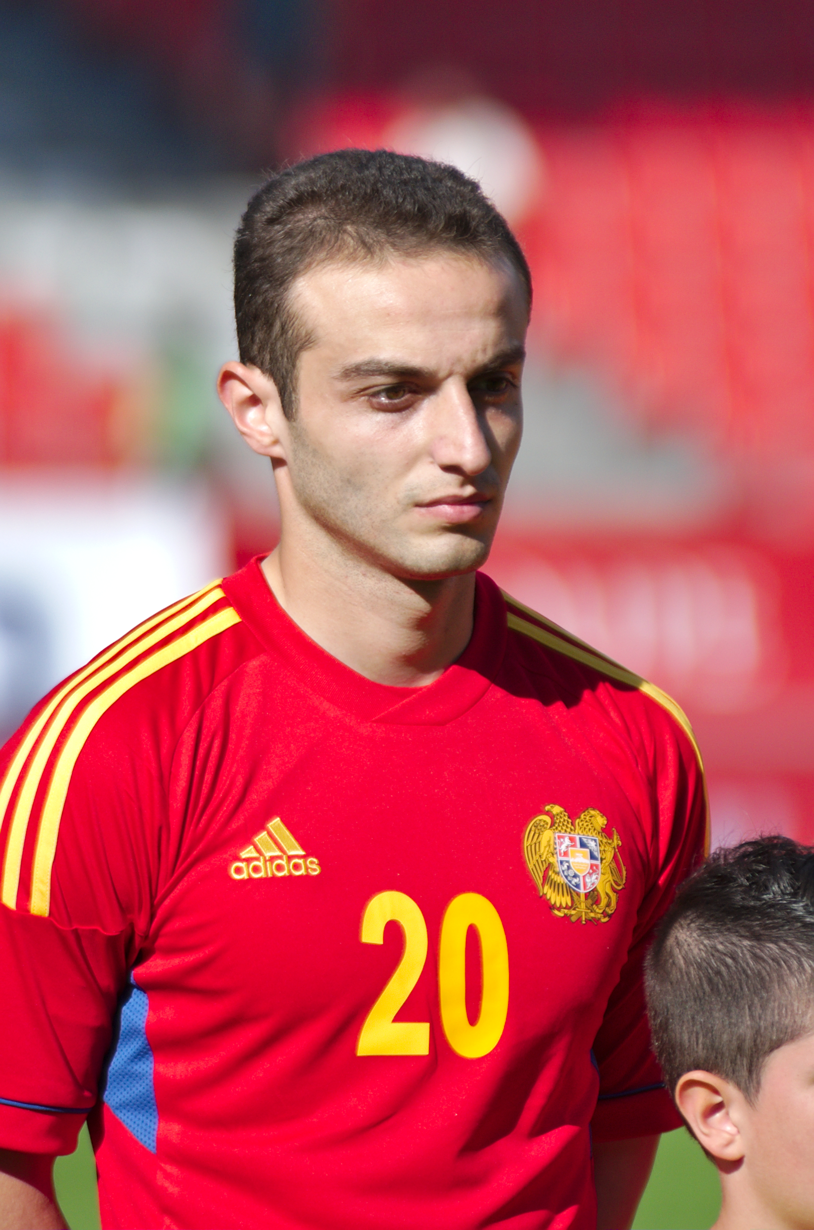 Algérie - Arménie - 20140531 - Levon Airapetyan